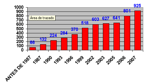 evolucion policia foral